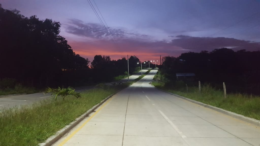 Un amanecer PRECIOSO...